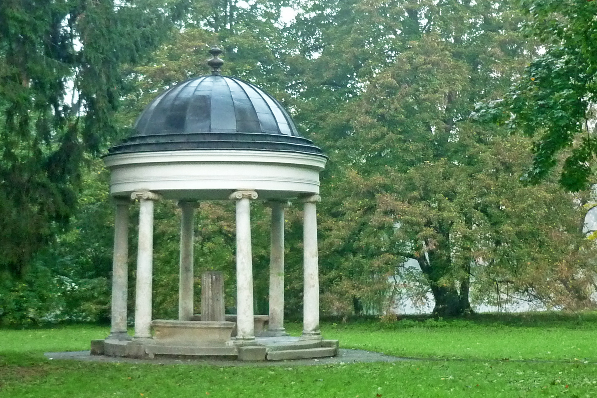 Freundschaftstempel im Schlosspark in Kremsier (Kroměříž) in Mähren